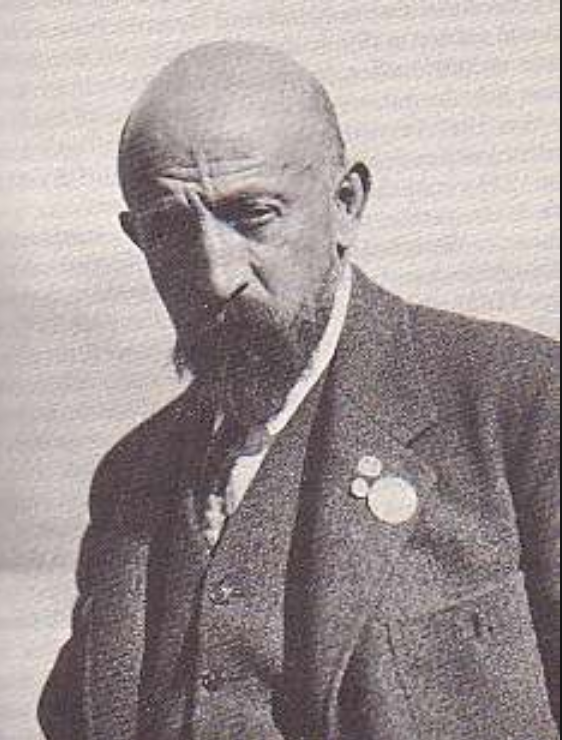 Foto Rudolf Gomperz: Freigabe durch Bildarchiv JMH Hohenems